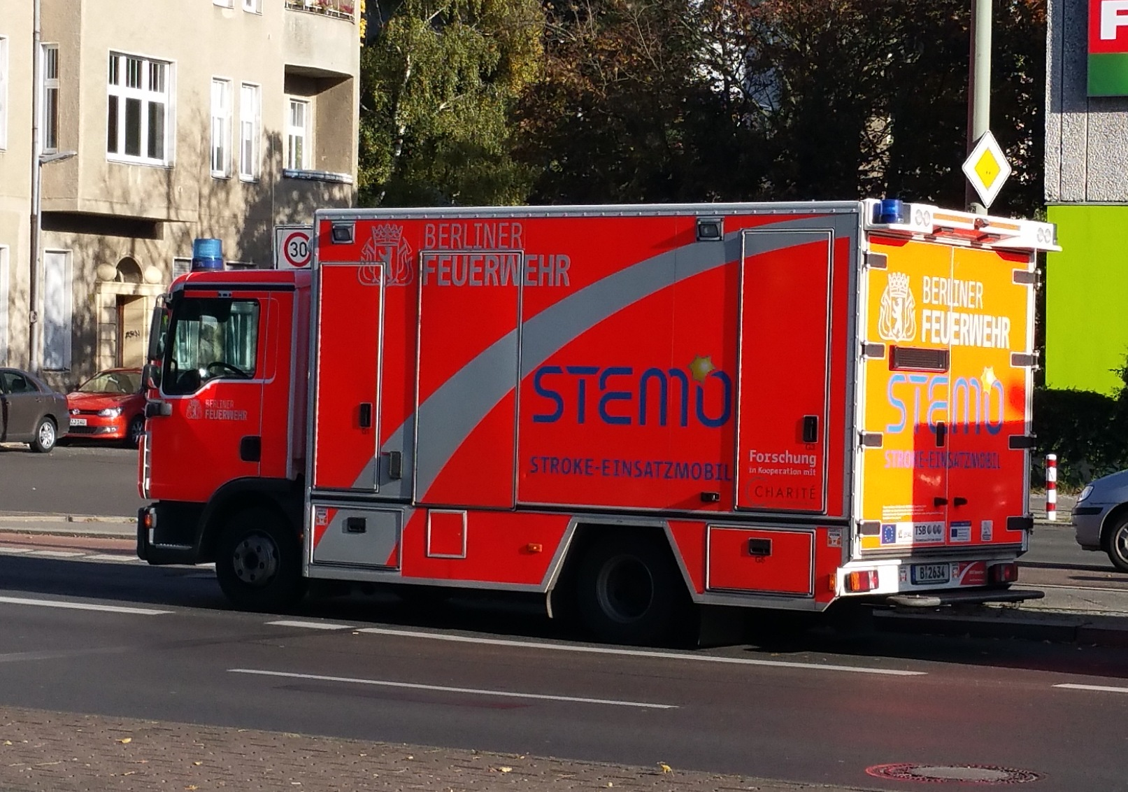 Stroke Einsatzmobil Berliner Feuerwehr für Schlaganfallpatienten. Fahrgestell: MAN TGL 12.250 4x2 BL